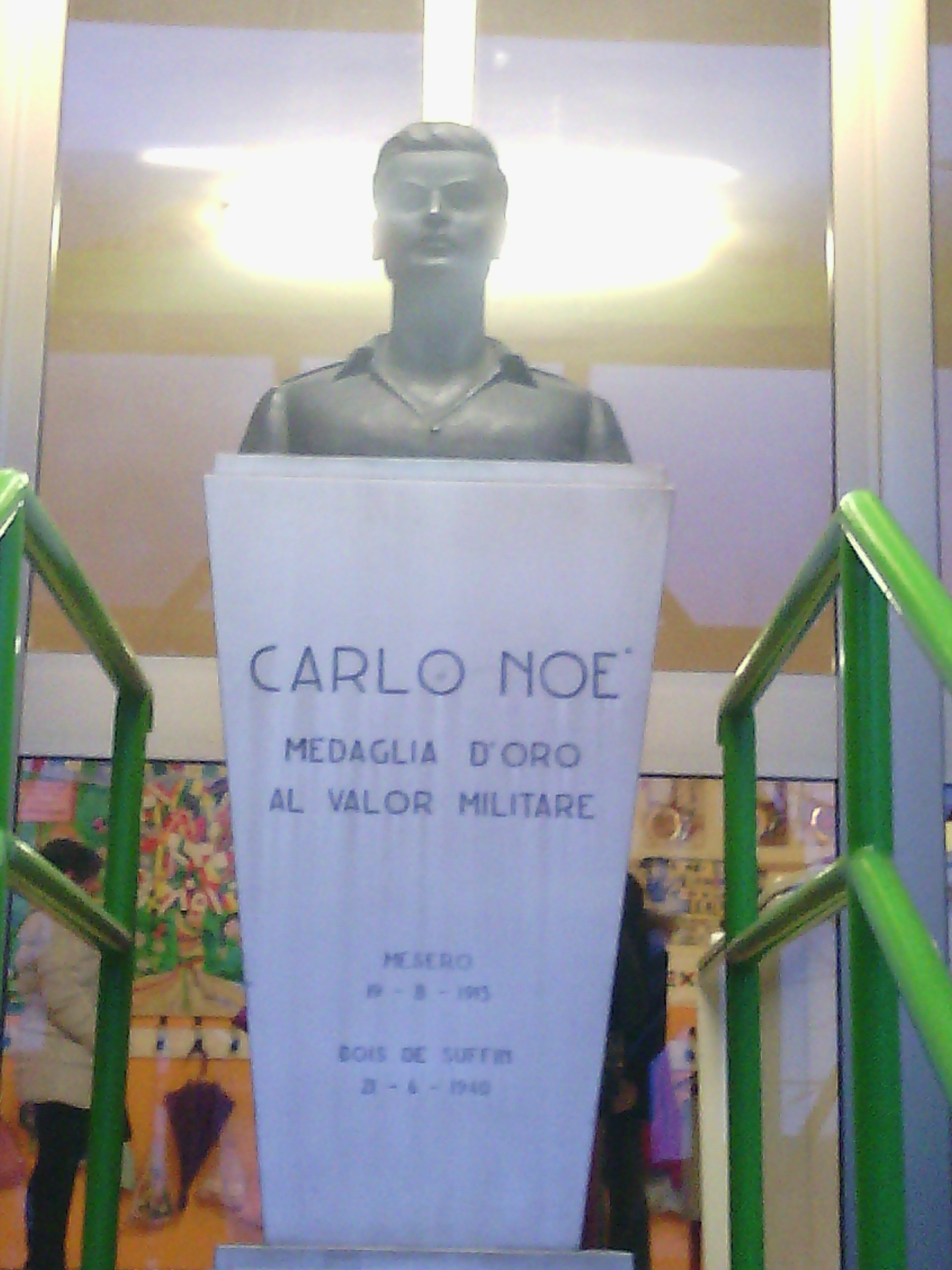 Busto di Carlo Noé, medaglia d'oro al valor militare, posto nella scuola che porta il suo nome a Mesero (MI)